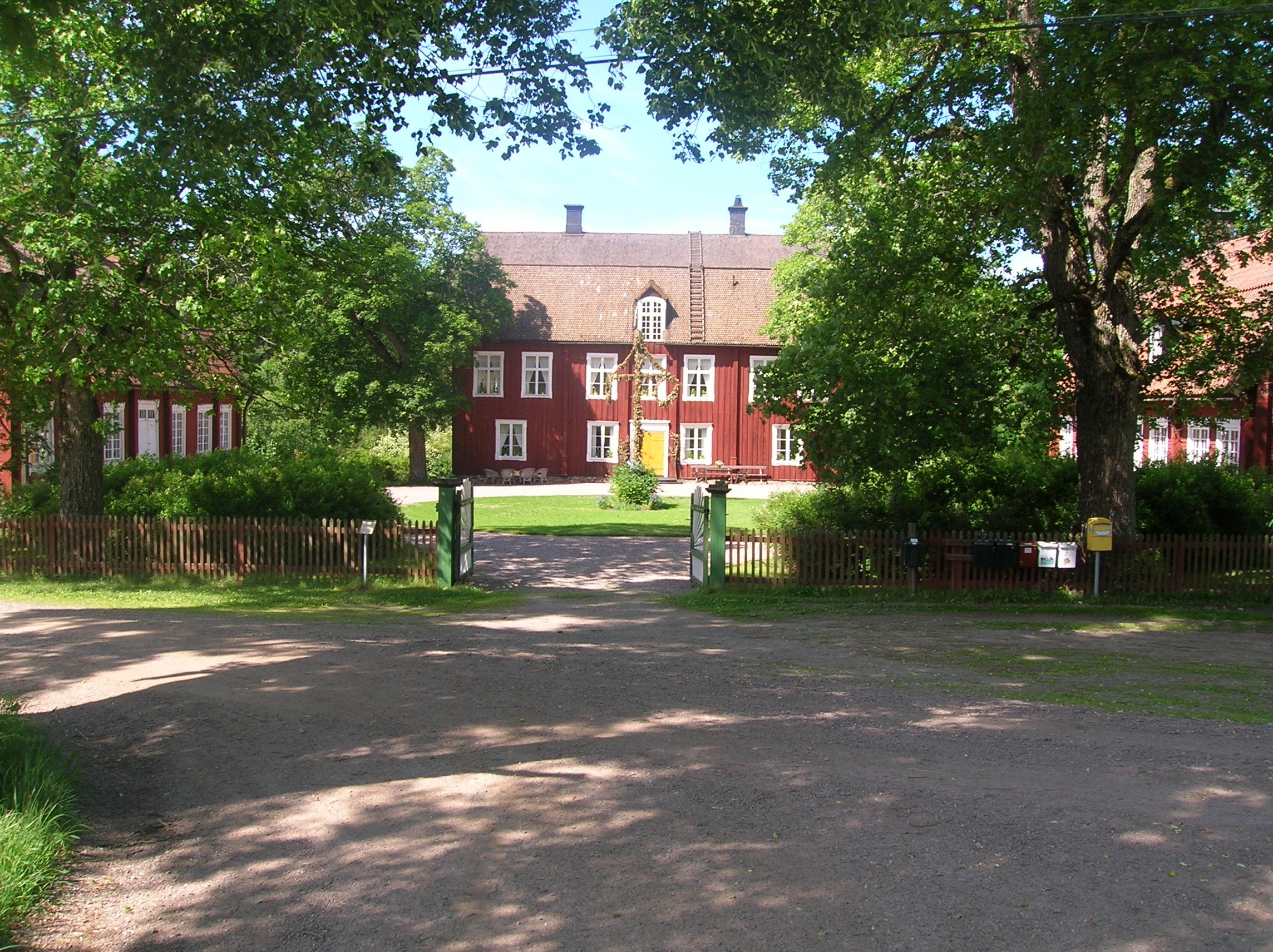 Rodga säteri, main entrance, in Norrköpings kommun, Sweden